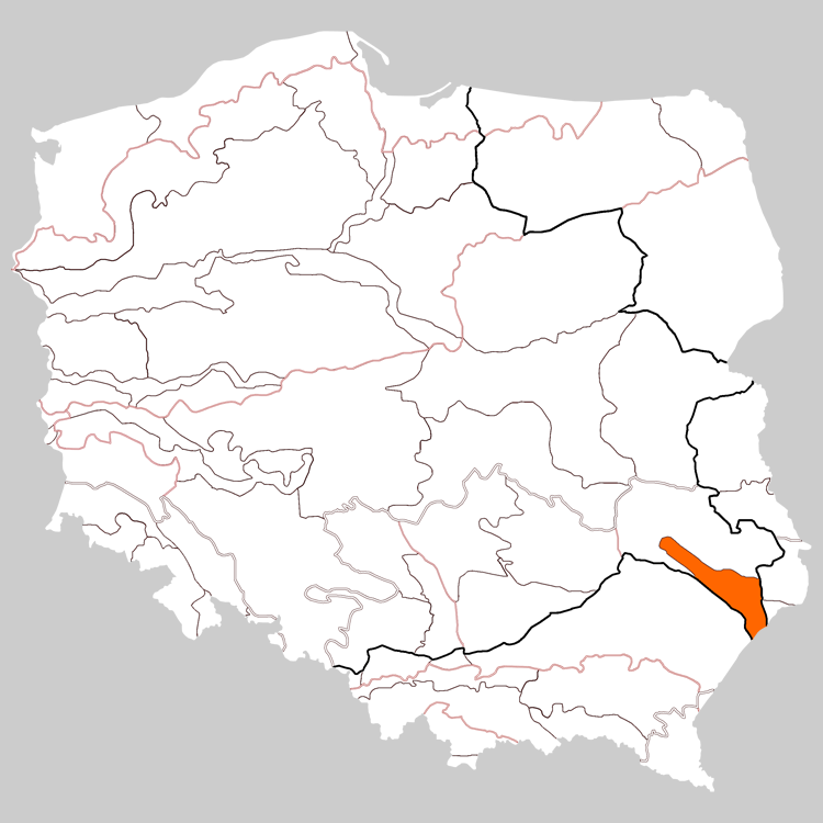 Physico-geographical regionalization of Poland Macroregion 343.2 Roztochia Regionalizacja fizycznogeograficzna Polski Makroregion 343.2 Roztocze